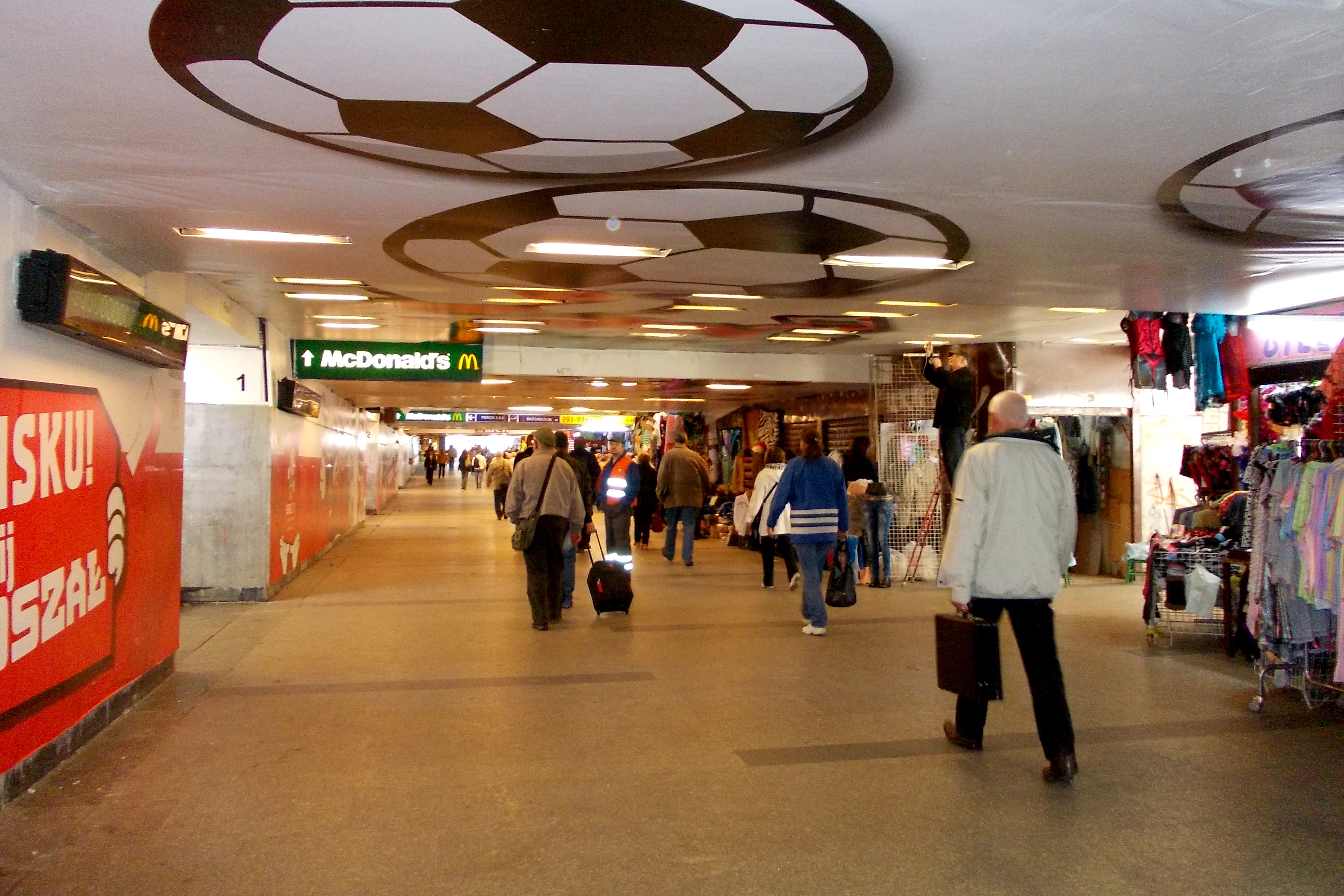 przejście pod torami w Gdańsku Głównym